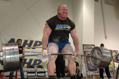 Holger Kuttroff @ Kings Of Bench & Clash Of Titans III